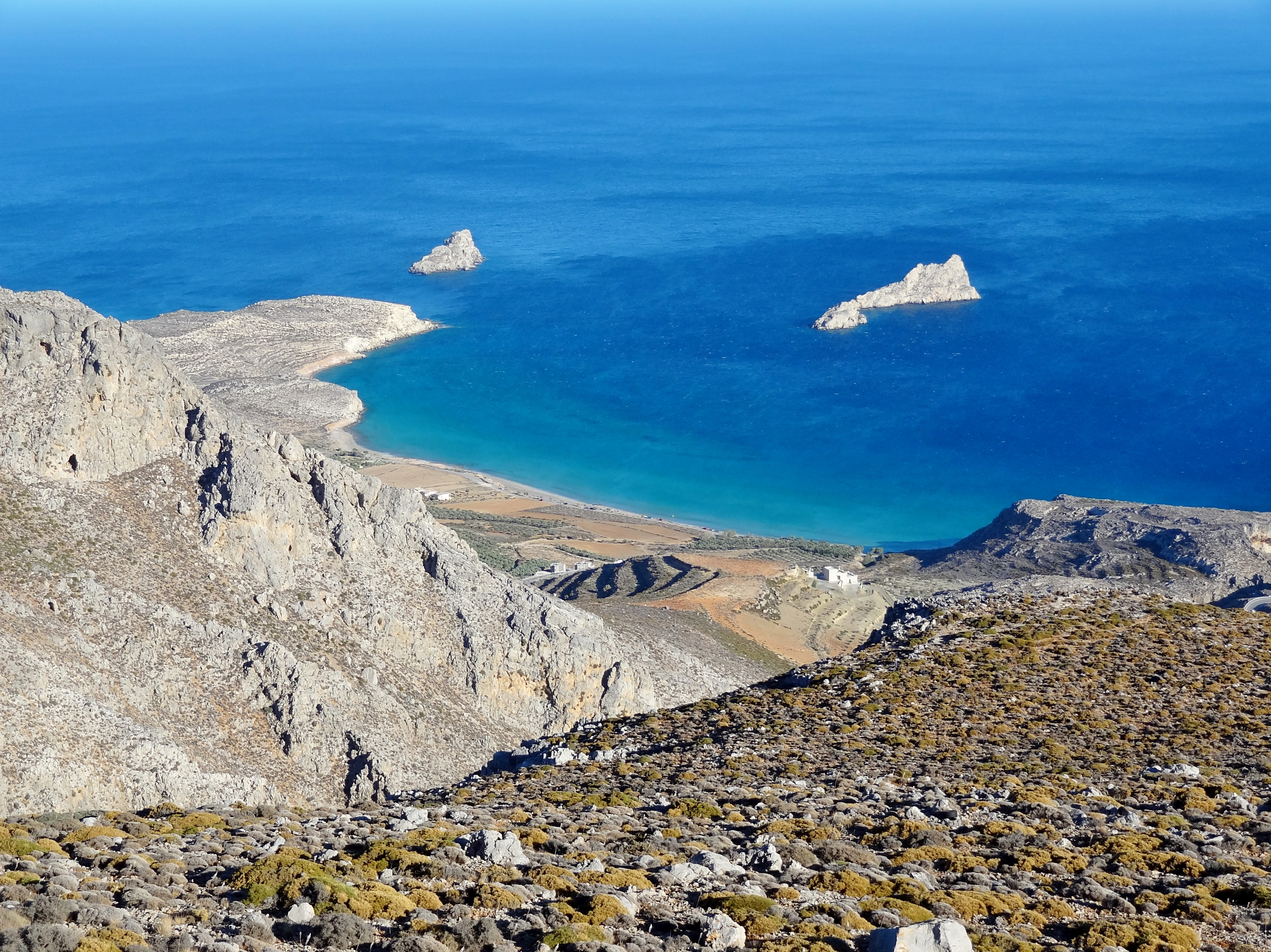 Xerokambos (Ξερόκαμπος ‚Trockene Ebene‘), Ort in der Gemeinde Sitia, Kreta, Griechenland